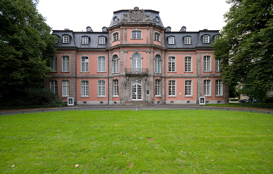 Schloss Jägerhof, Düsseldorf, aktuelle Ansicht